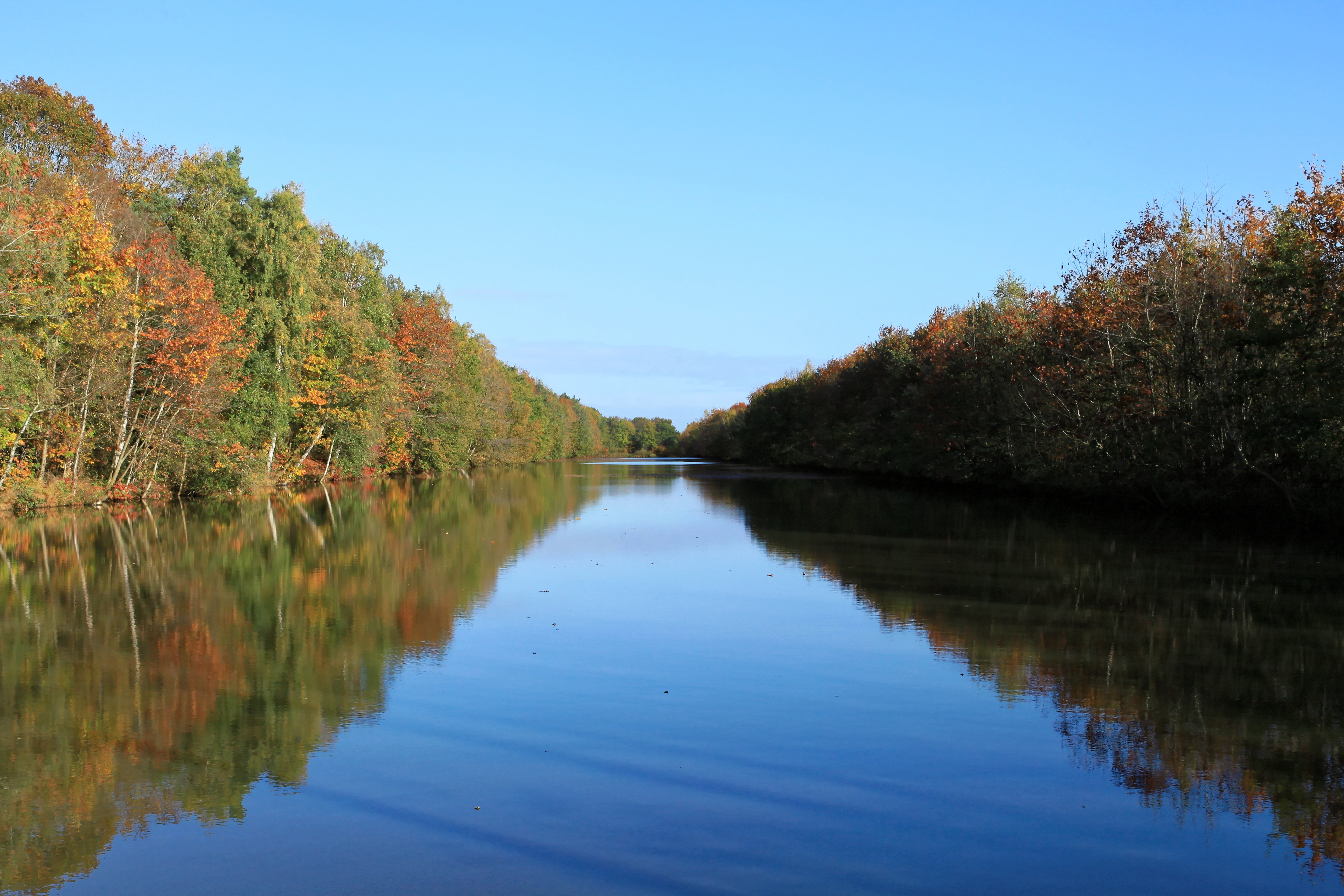 Seitenkanal Gleesen-Papenburg an der Kathener Dorfstraße in Lathen